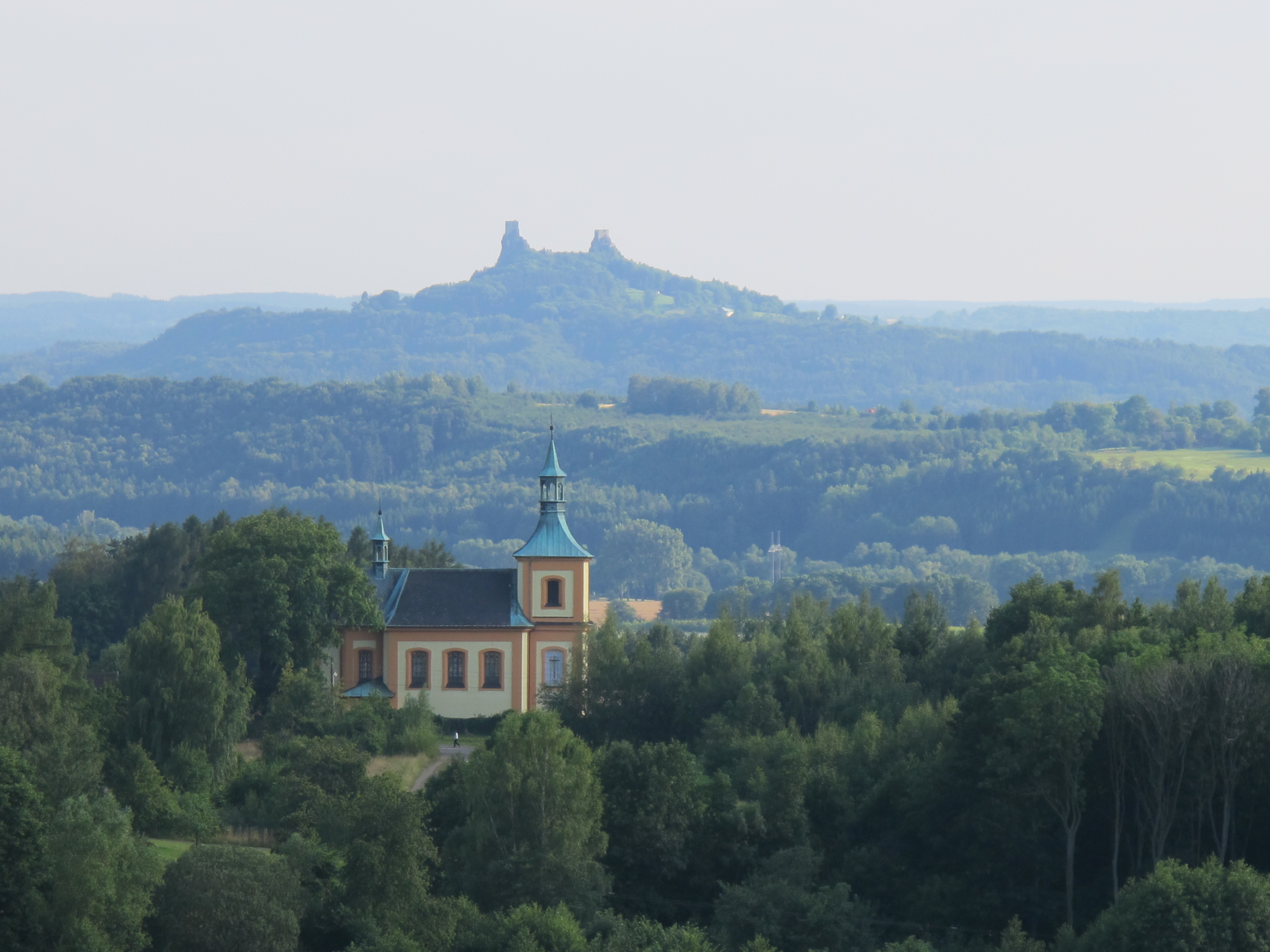 Pohled na Trosky a tatobitský kostel